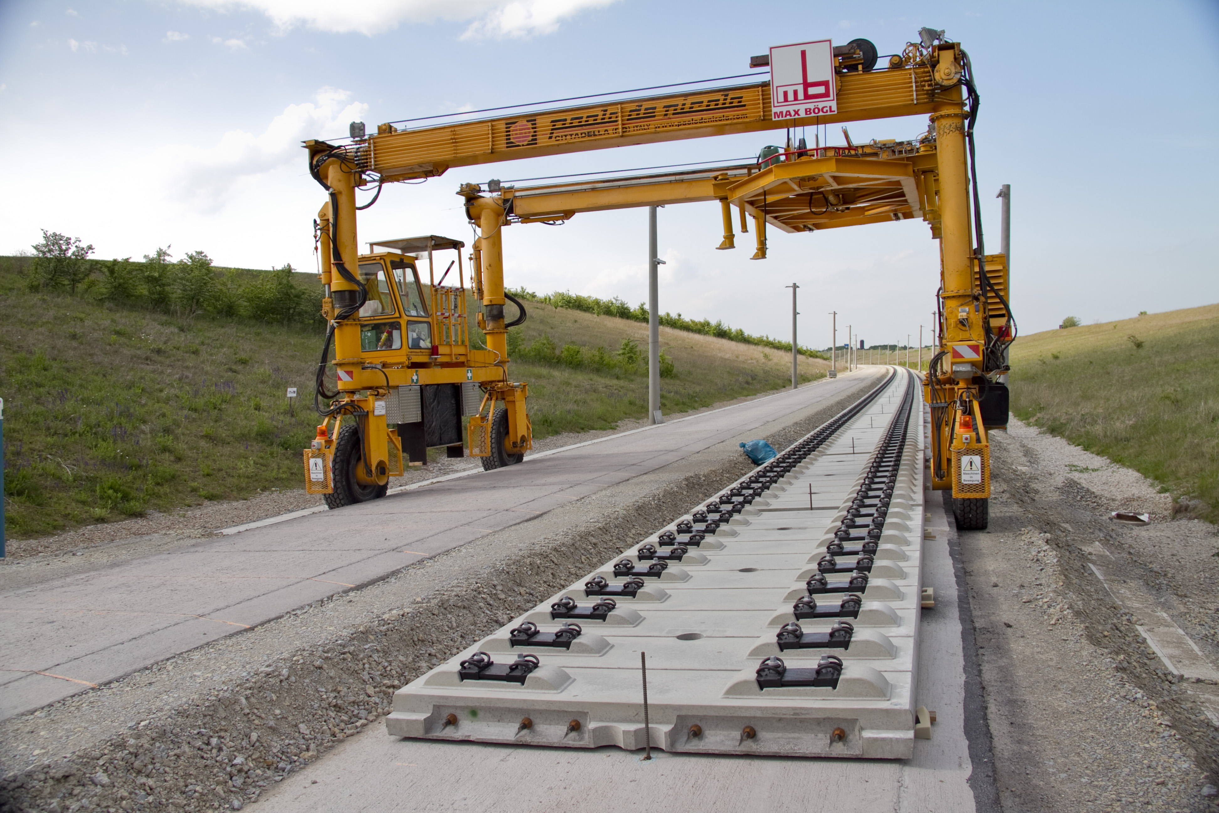 Montage Gleistragplatten Feste Fahrbahn System Bögl in der Nähe von Arnstadt